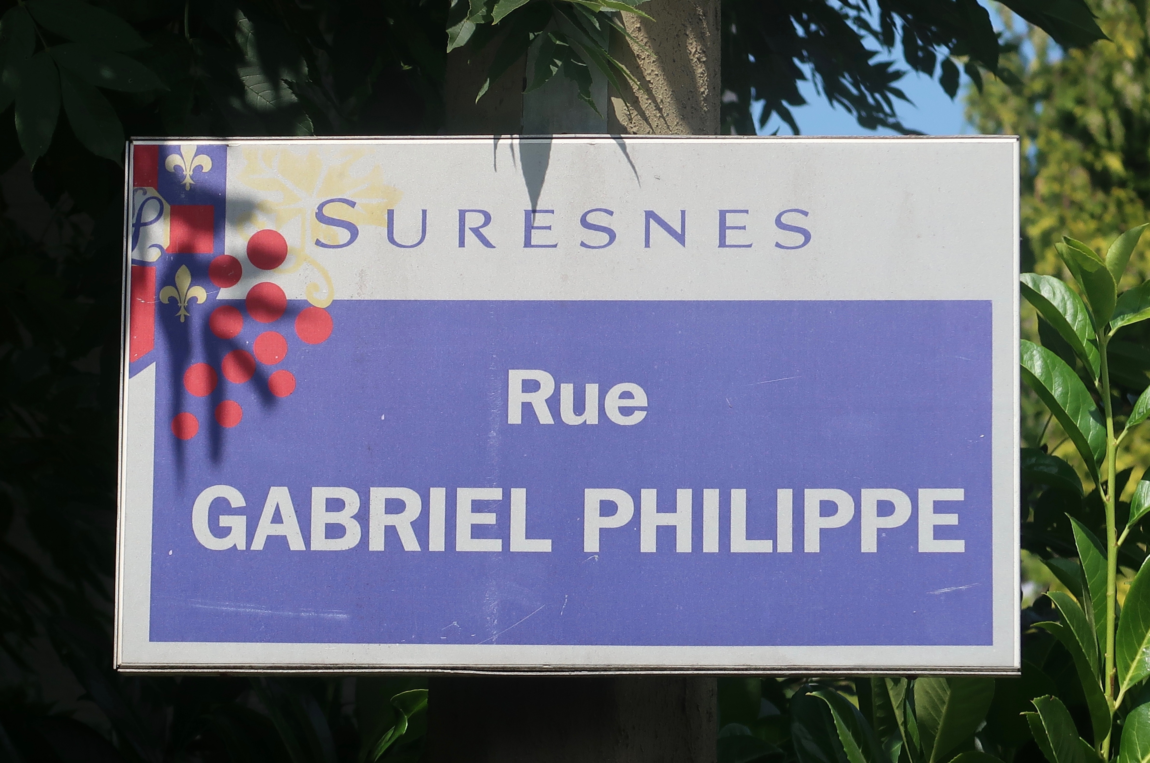 Plaque de la rue Gabriel-Philippe à Suresnes (Hauts-de-Seine).